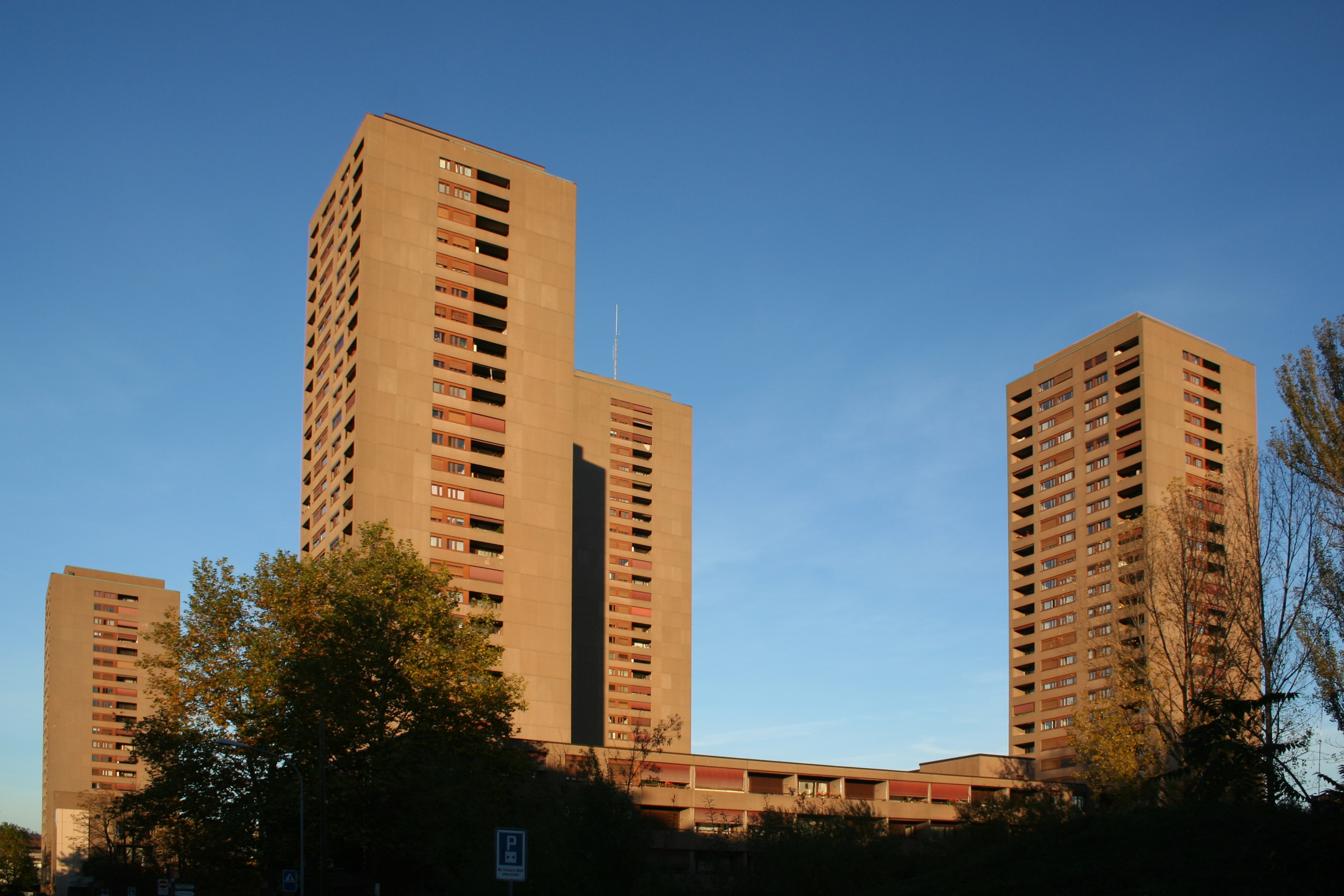 Hardauhochhäuser in Zürich, Schweiz. Der höchste der vier Türme ist das höchste Haus Zürichs